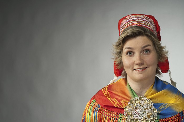 Fotograf: Bjørn Joachimsen, Foto Nord Aili Keskitalo er NSRs presidentkandidat til sametingsvalget 2017.